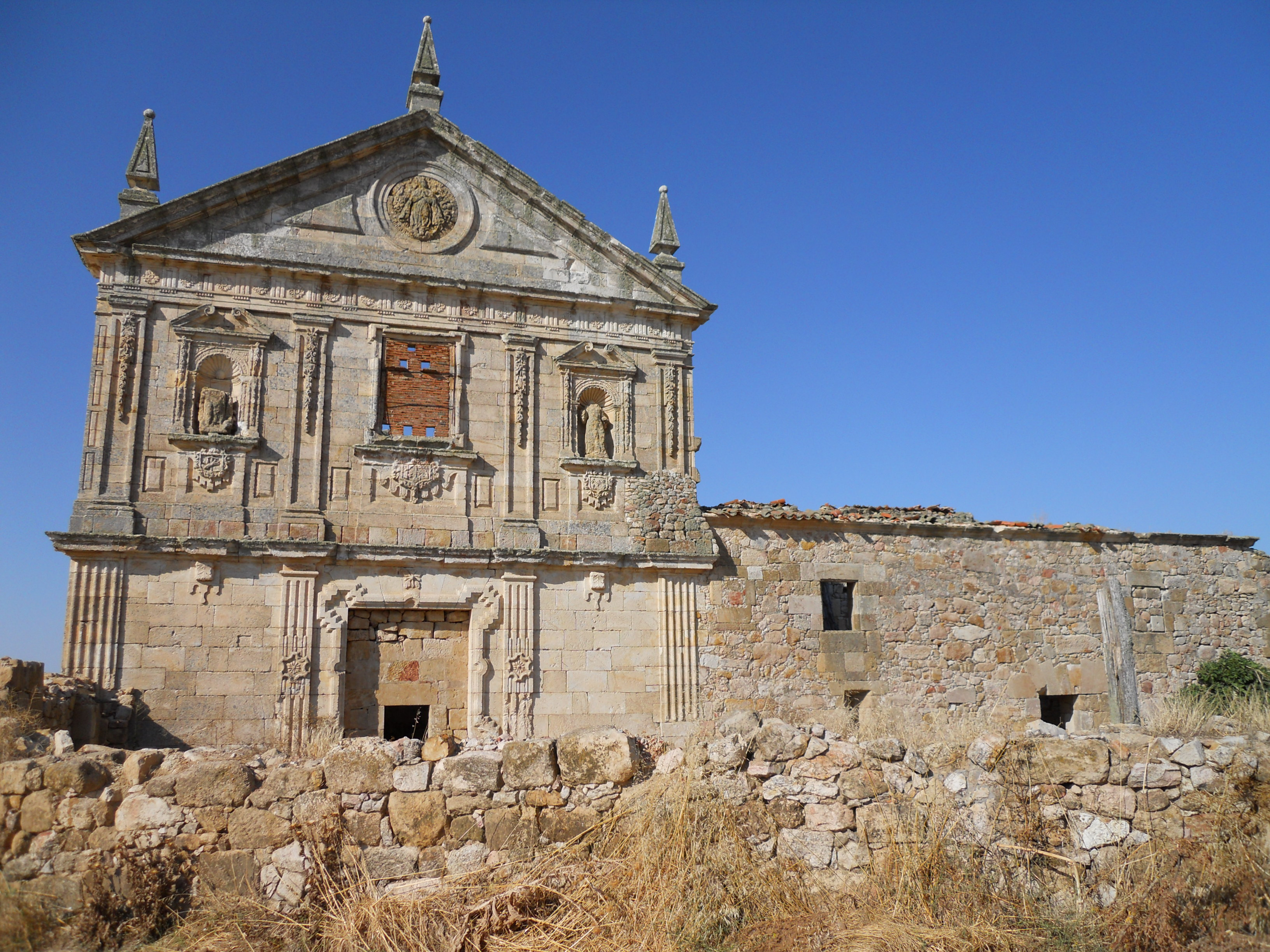 Monasterio de Santa María de la Paz del Soto en Villanueva de Campeán.